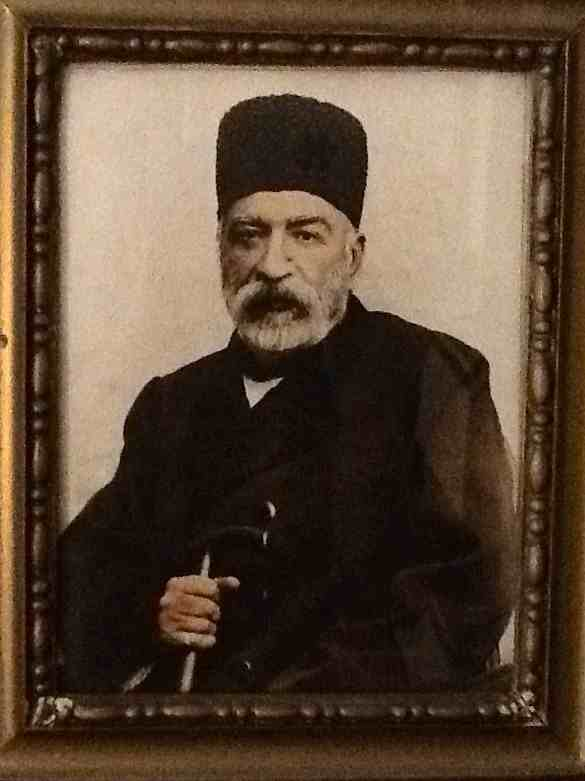 دکتر میرزا علی‌اکبرخان نفیسی ناظم‌الاطبا